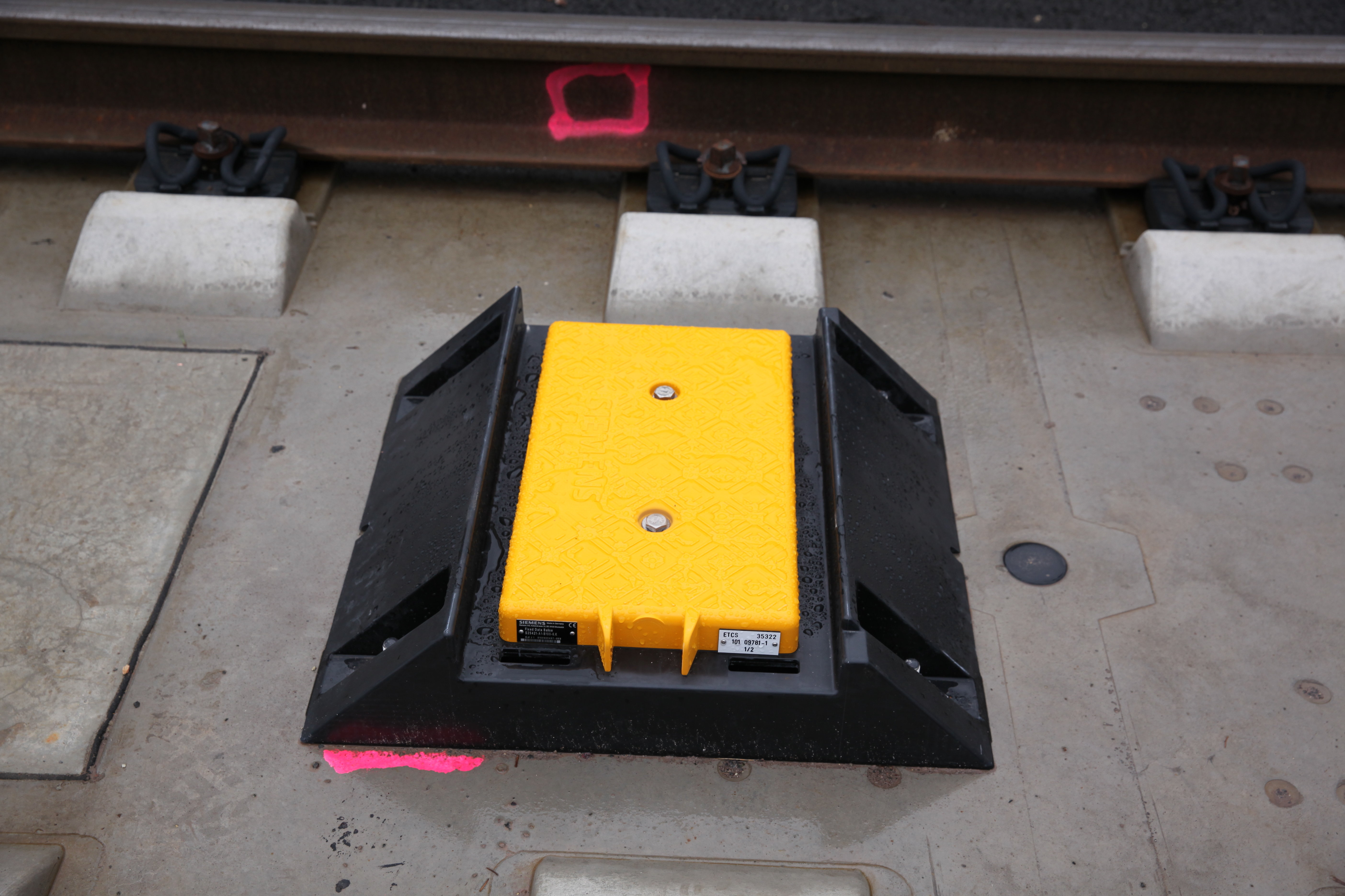 Eurobalise auf der Neubaustrecke Ebensfeld-Erfurt, am Schaltposten Niederfüllbach